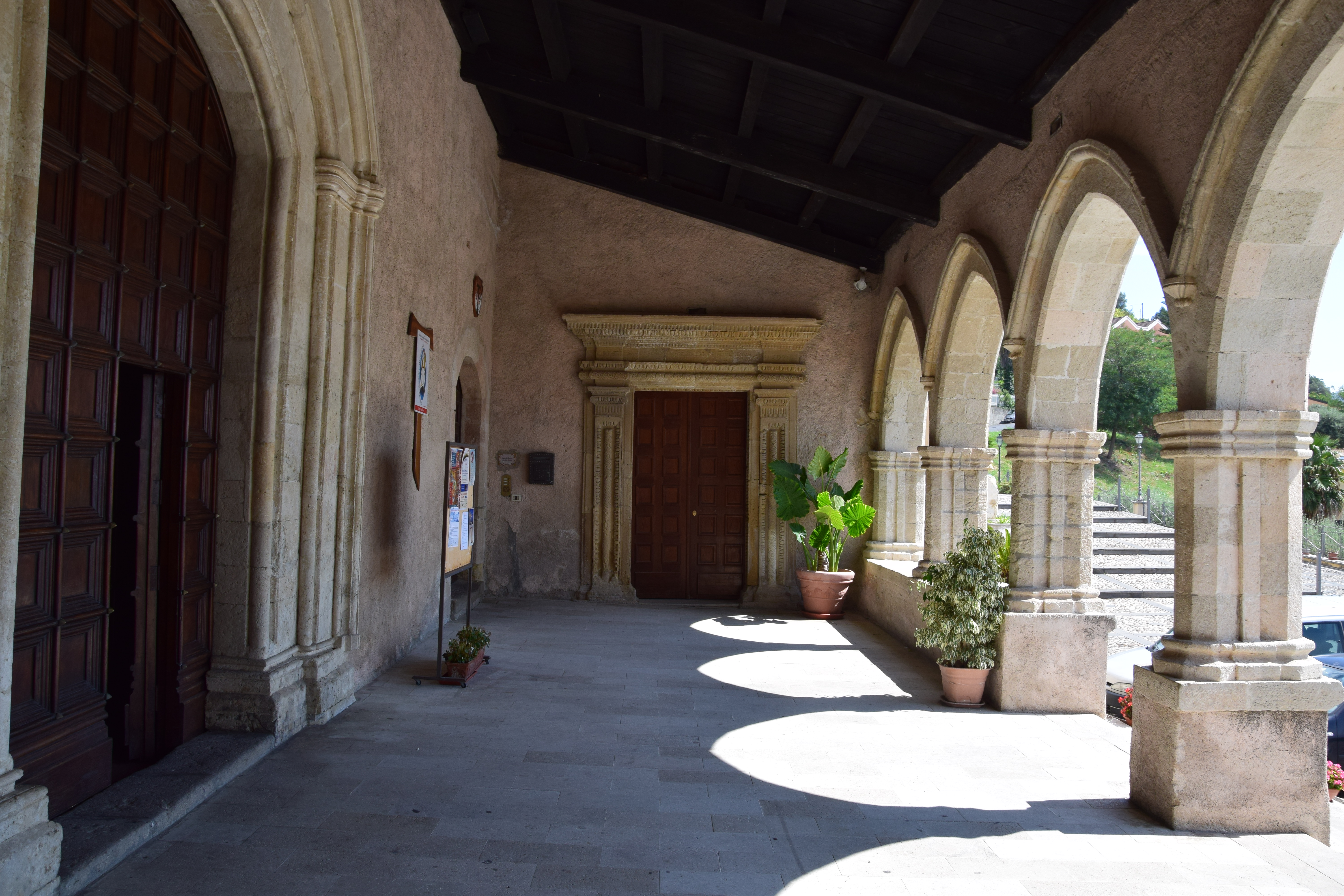 Convento di San Bernardino da Siena This is a photo of a monument which is part of cultural heritage of Italy.